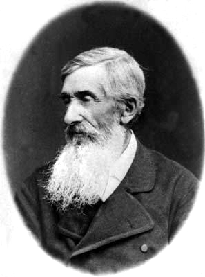 Срезневский, Измаил Иванович